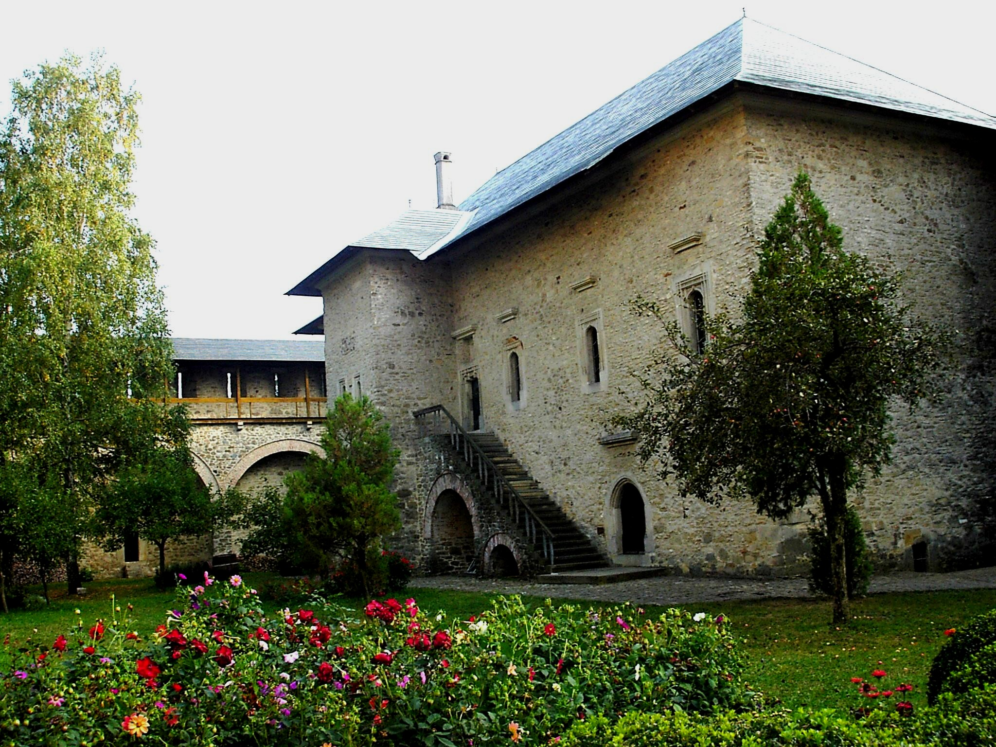 DRAGOMIRNA